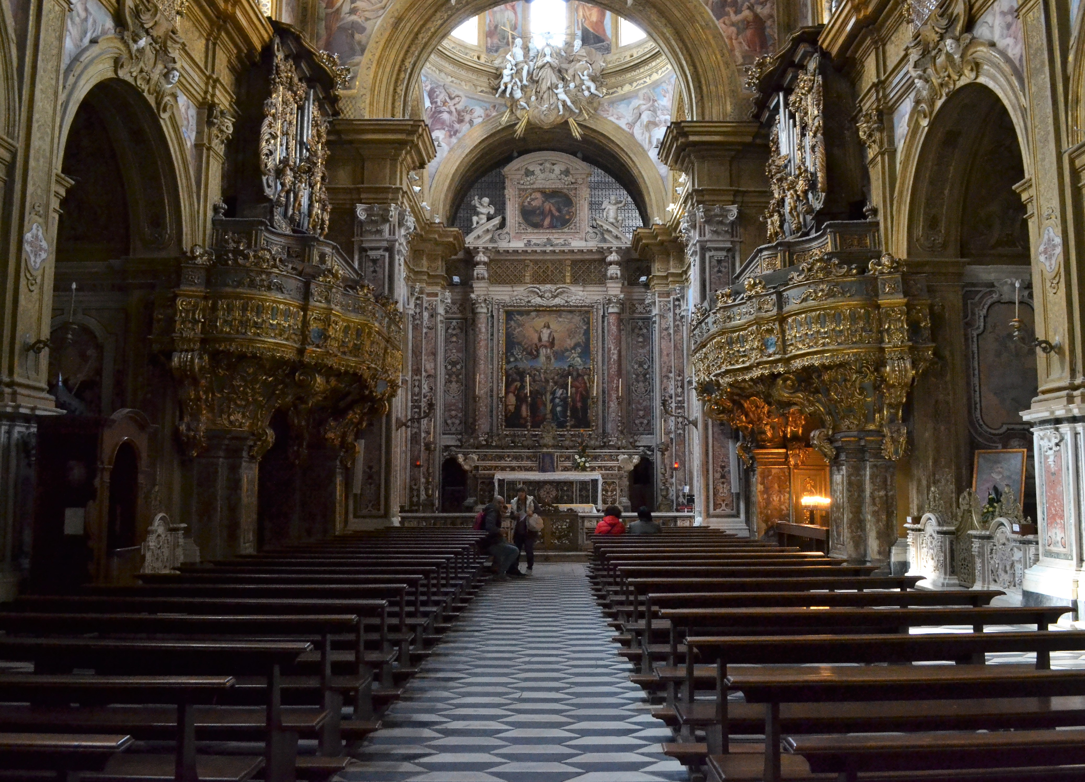 Chiesa di San Gregorio Armeno - Interno